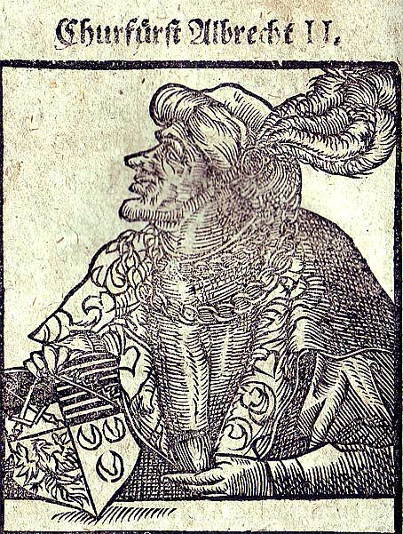 Albrecht II von Sachsen-Wittenberg, Holzschnitt nach Vorlagen der Ahnengalerie des Kurfürsten Friedrichs des Weisen im Schloss Wittenberg aus dem Jahre 1596 von Balthasar Mencius /Menz erstellt.